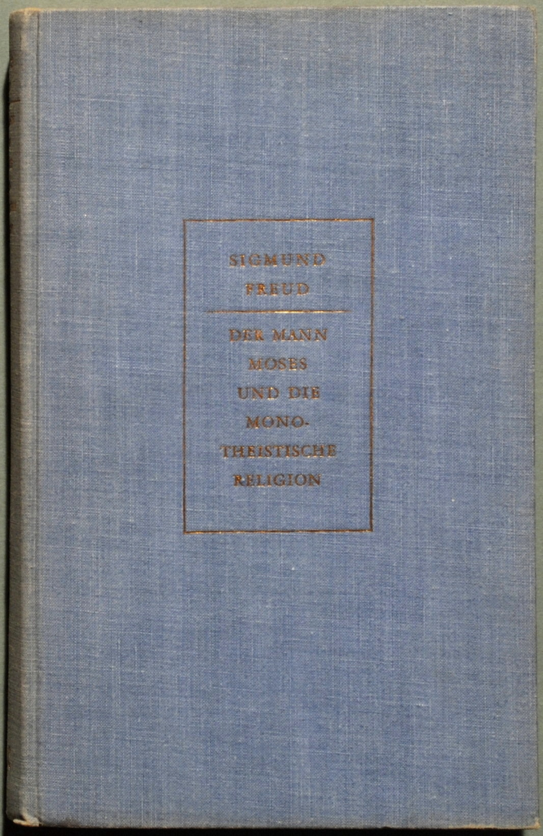 Freud, Sigmund: Der Mann Moses und die monotheistische Religion. Drei Abhandlungen. Amsterdam: A. de Lange 1939, 241 Seiten